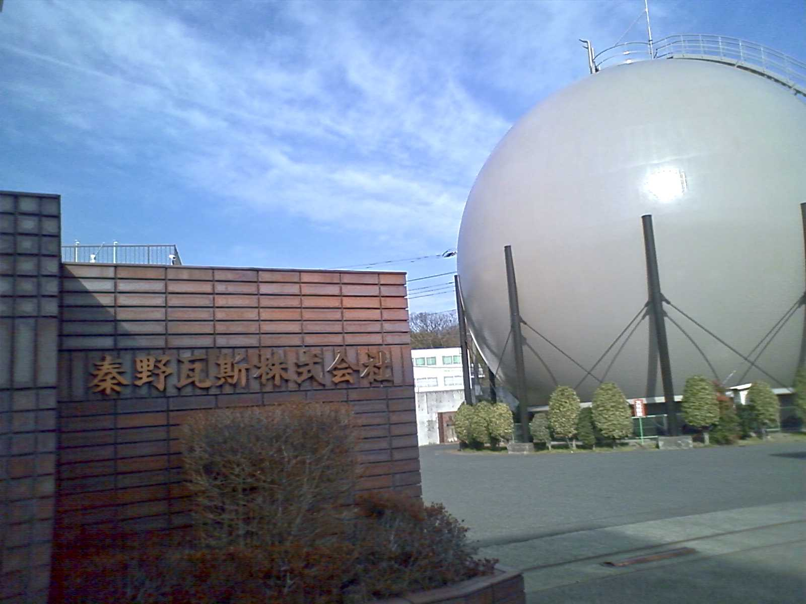 秦野ガス の 球形ガスホルダー ガスタンク は 環境色彩 の 10YR系